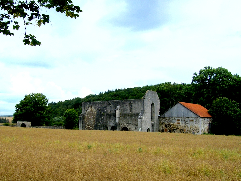 Klosterruine Schaaken (Gesamtansicht)